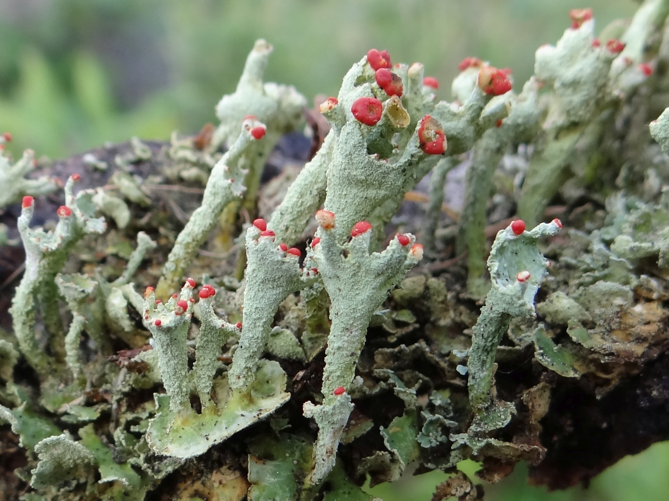 Cladonia digitata (location:Poland, Beskid Wyspowy, Łopień)